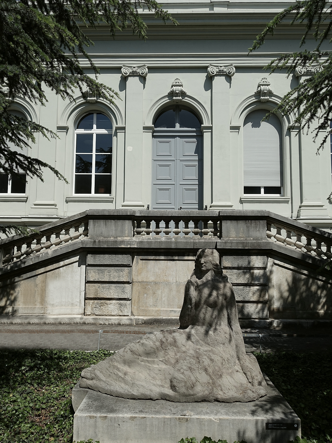 Die Skulptur ging aus dem Projekt-Wettbewerb des Kunstkredit Basel-Stadt als Sieger hervor und stand früher an der Steinenschanze in Basel. Sie zeigt ein Abbild von Anna Haffner (1878–1954) aus Binninge. Heute ist sie vor dem Bernoullianum in Basel zu sehen.